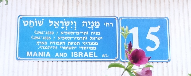 שלט רחוב מניה וישראל (שוחט) ברמת אביב, תל אביב